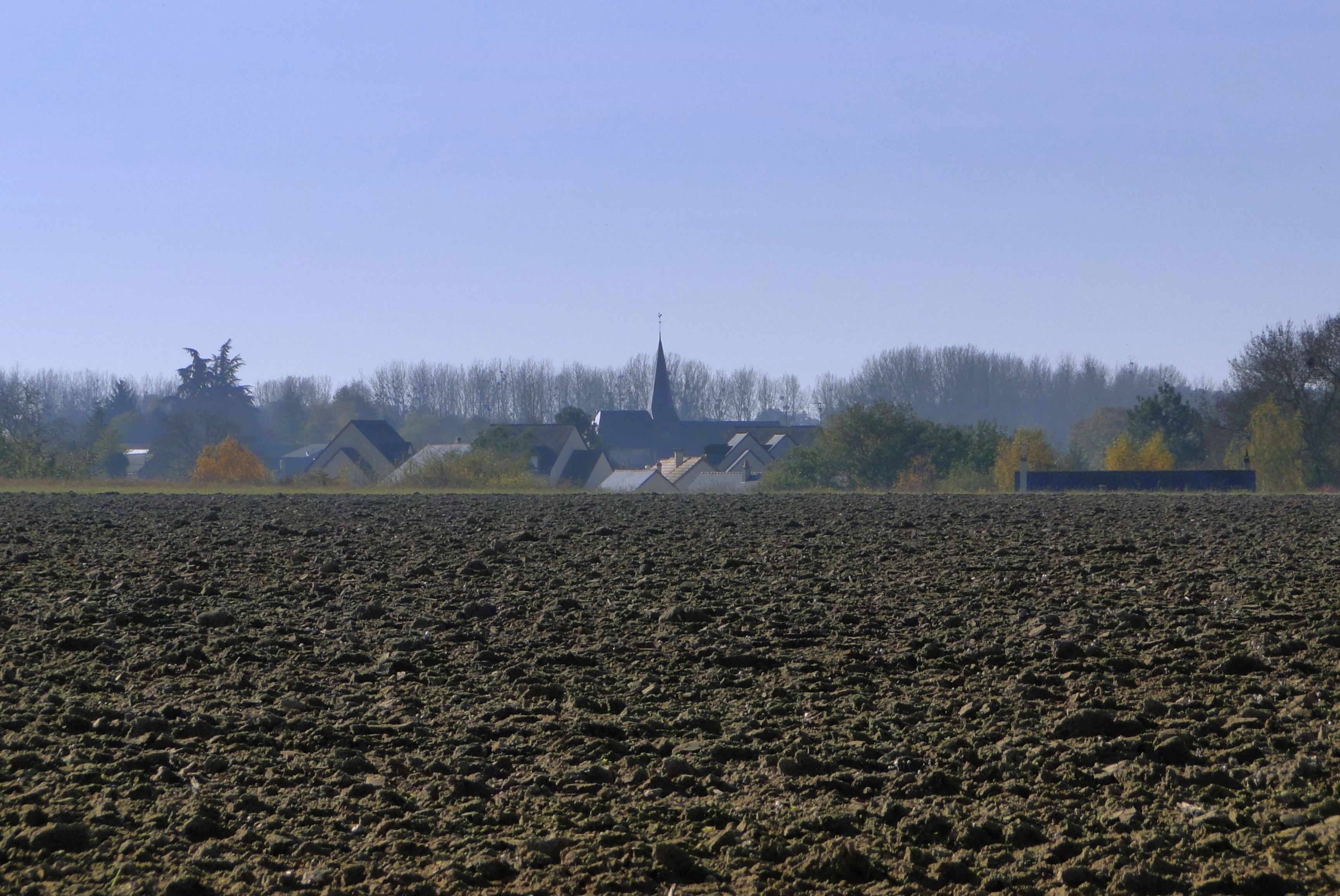 Savigné-sous-le-Lude - vue générale